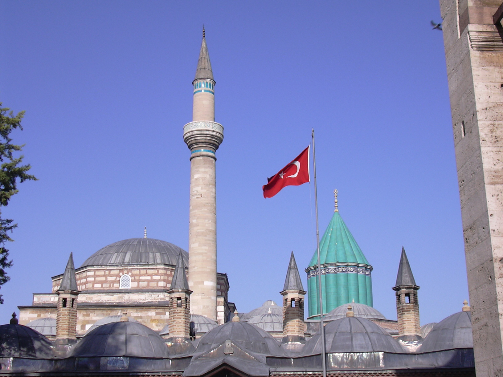 Mecset, Törökország, Konya városa. Dzseláleddin Rúmi múzeuma mellett.